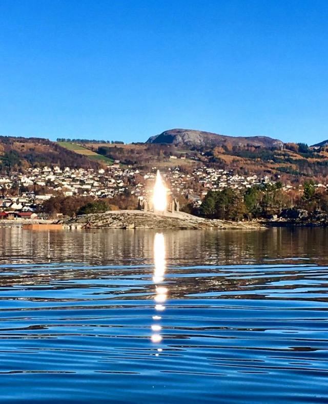 Solspeilet på Klungholmen utenfor Jørpeland i Strand kommune.